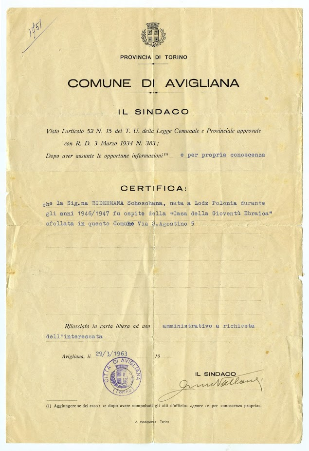 אישור שהיה בית ילדים באבליאנה